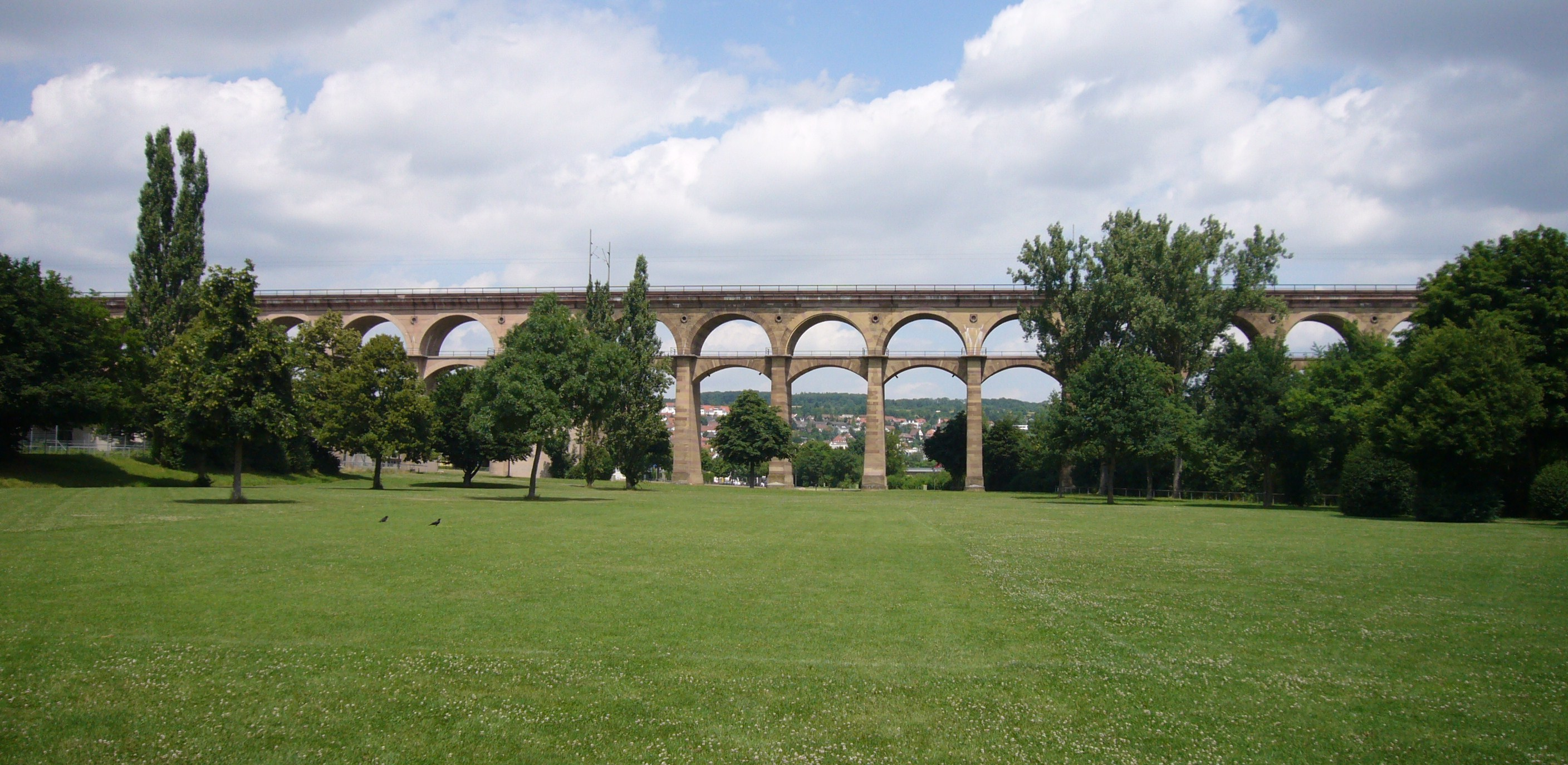 Der Bietigheimer Eisenbahnviadukt